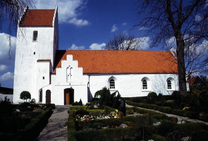 Svinninge Kirke i Danmark. Svinninge kirke